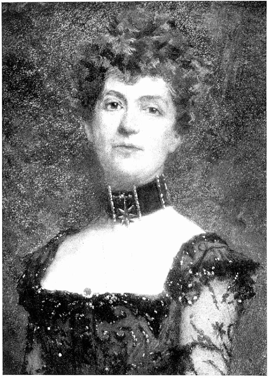 1900 - Elisabeth (Bessie) Richards soţia lui Take Ionescu,la vârsta de 40 de ani